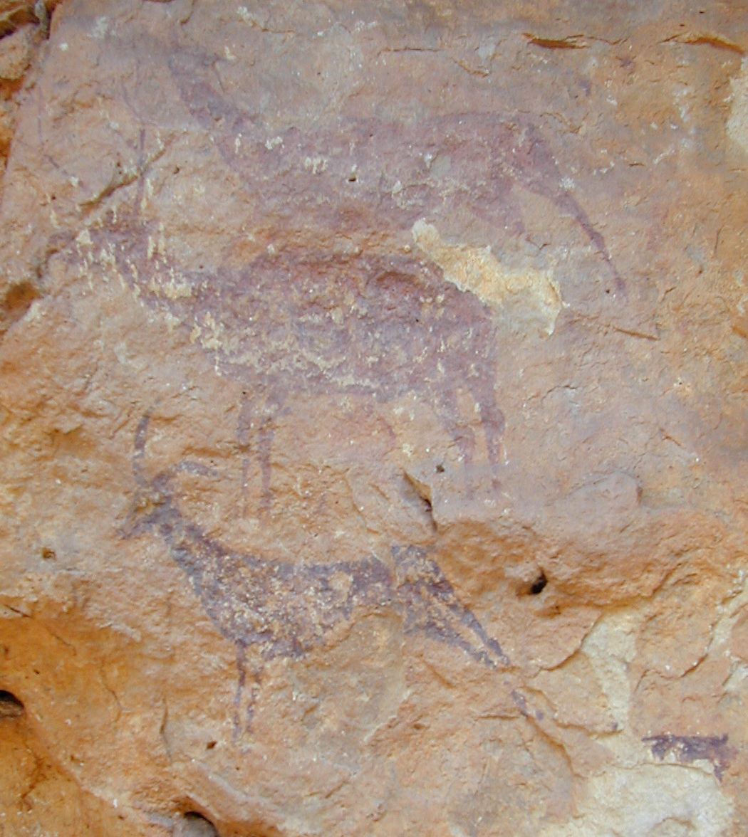 Pintures rupestres a la Cova de l'Aranya, epipaleolítica, Bicorp, Comunidad Valenciana